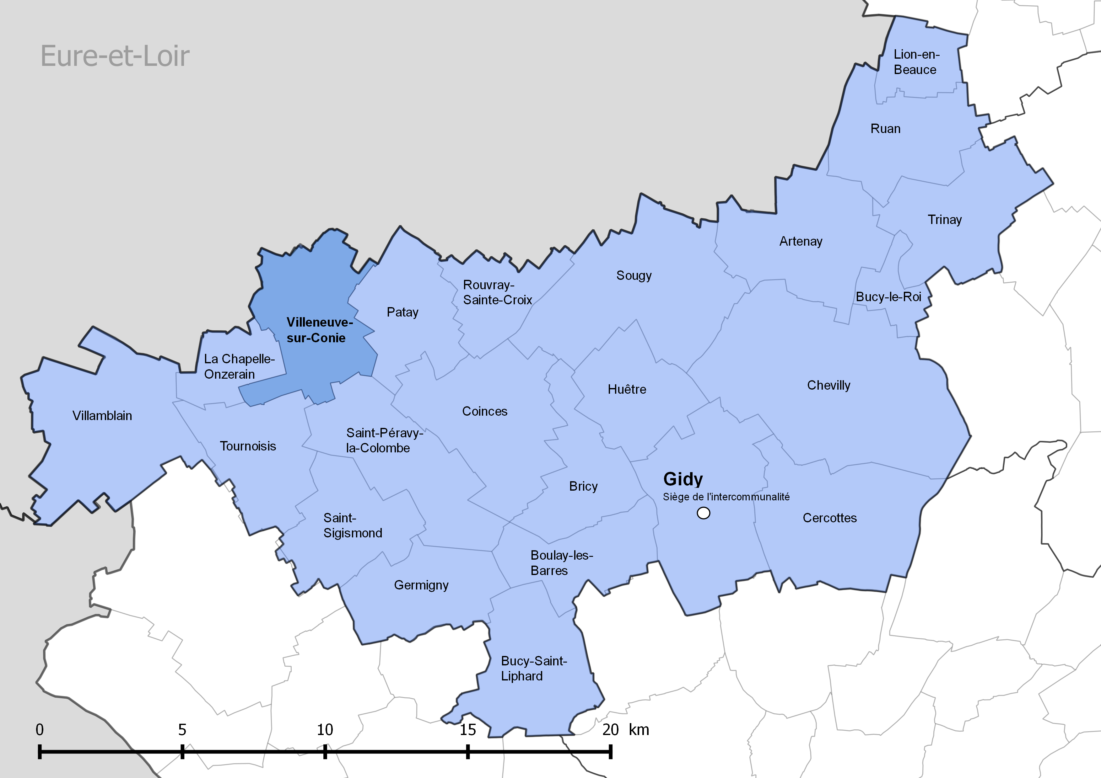 Périmètre de la communauté de communes de la Beauce loirétaine - Situation de la commune de Villeneuve-sur-Conie